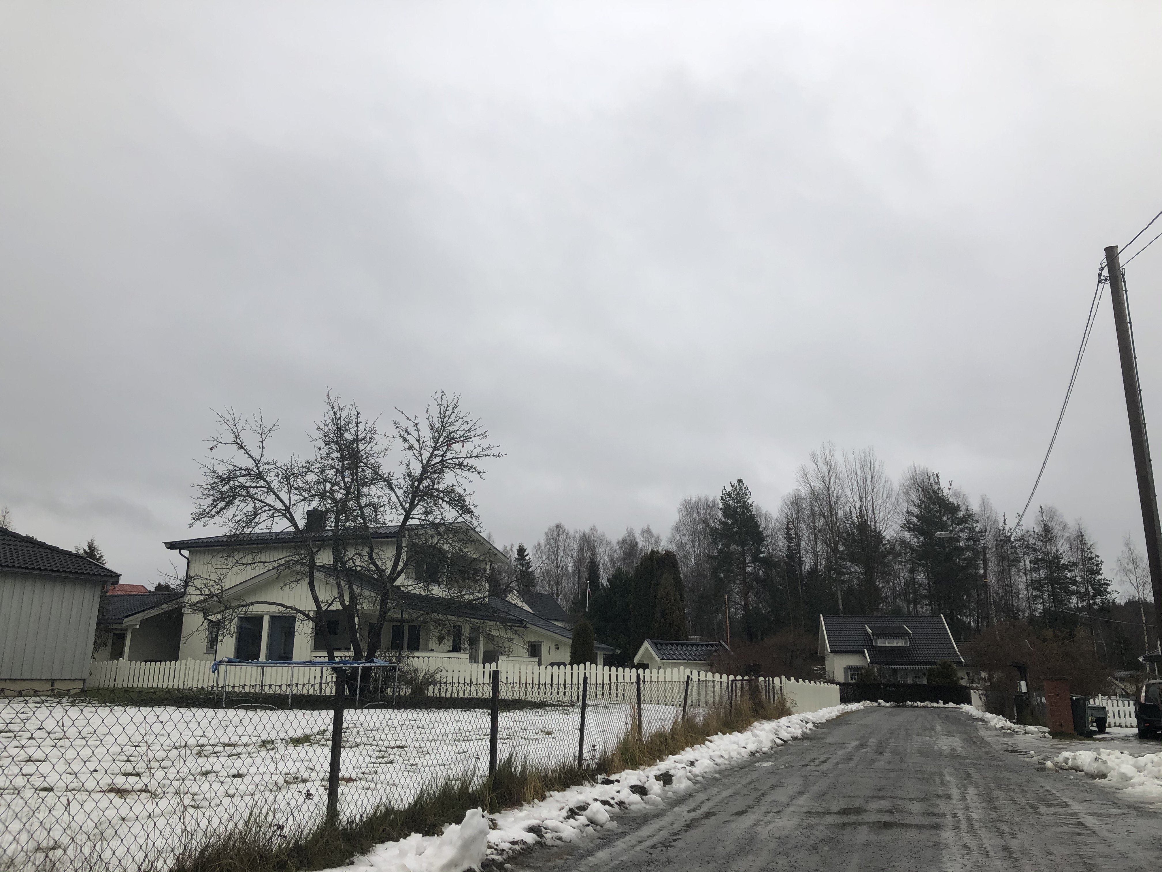 Nedre Begnamoen, Hønefoss